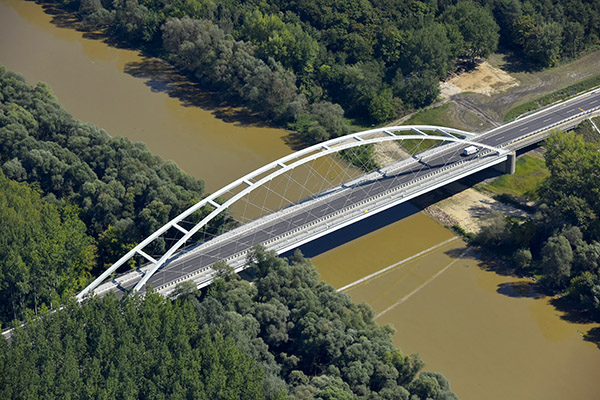 A Mosoni-Duna (Klatsmányi Tibor) hídja 2017-ben készült, légi felvételen, 813-as út